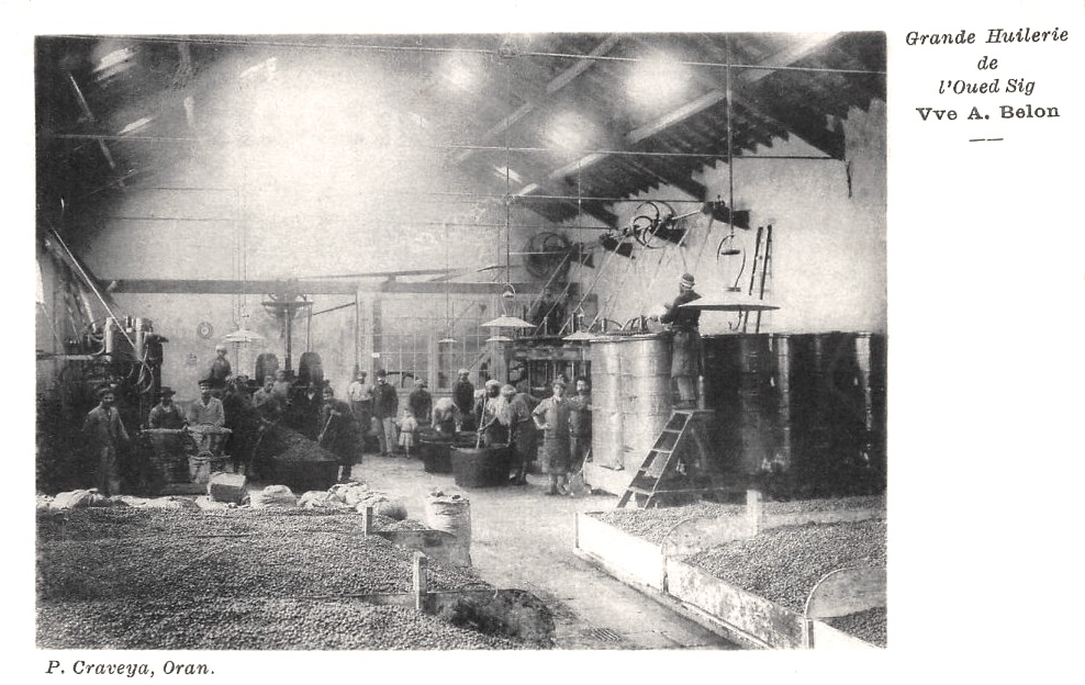 Huilerie de l'Oued Sig (Algérie), avant 1910. Veuve A. Belon.